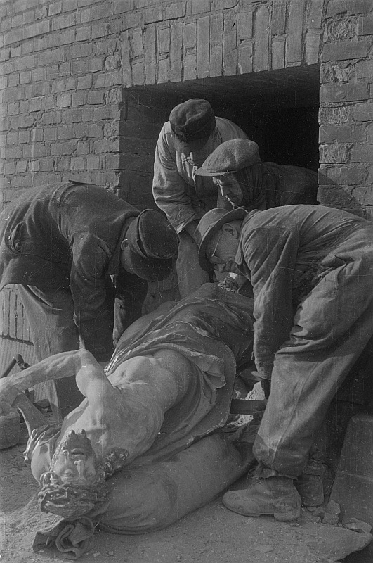 Original image description from the Deutsche Fotothek Dresden. Vier Männer bei der Bergung und Sicherstellung der Plastik "Schmerzensmann" (nach 1630, Sebastian Walther) aus der Frauenkirche